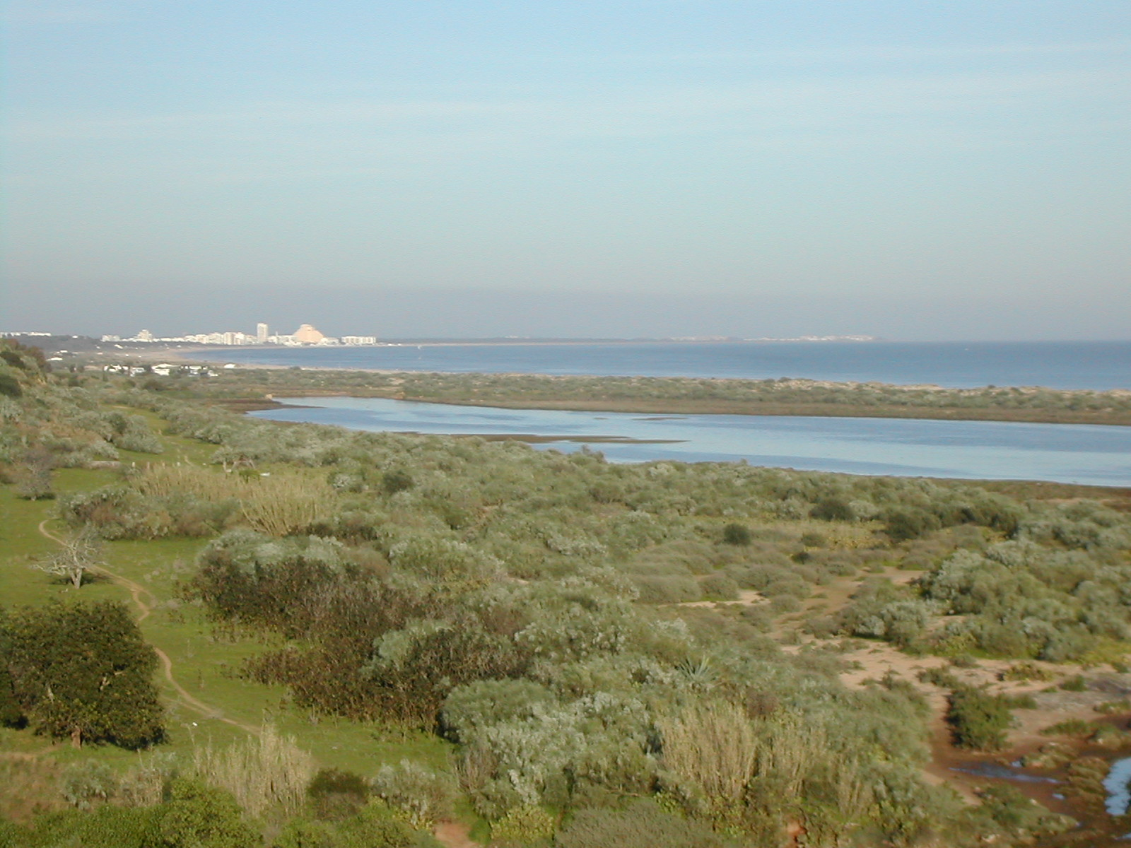 Troço final da Ria Formosa, a leste. Ao fundo vê-se Monte Gordo e mais à direita a Ilha Canela em Espanha.